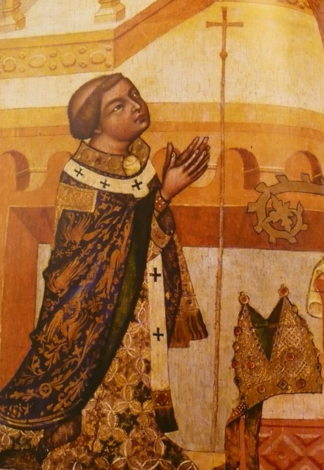 Arnost z Pardubic